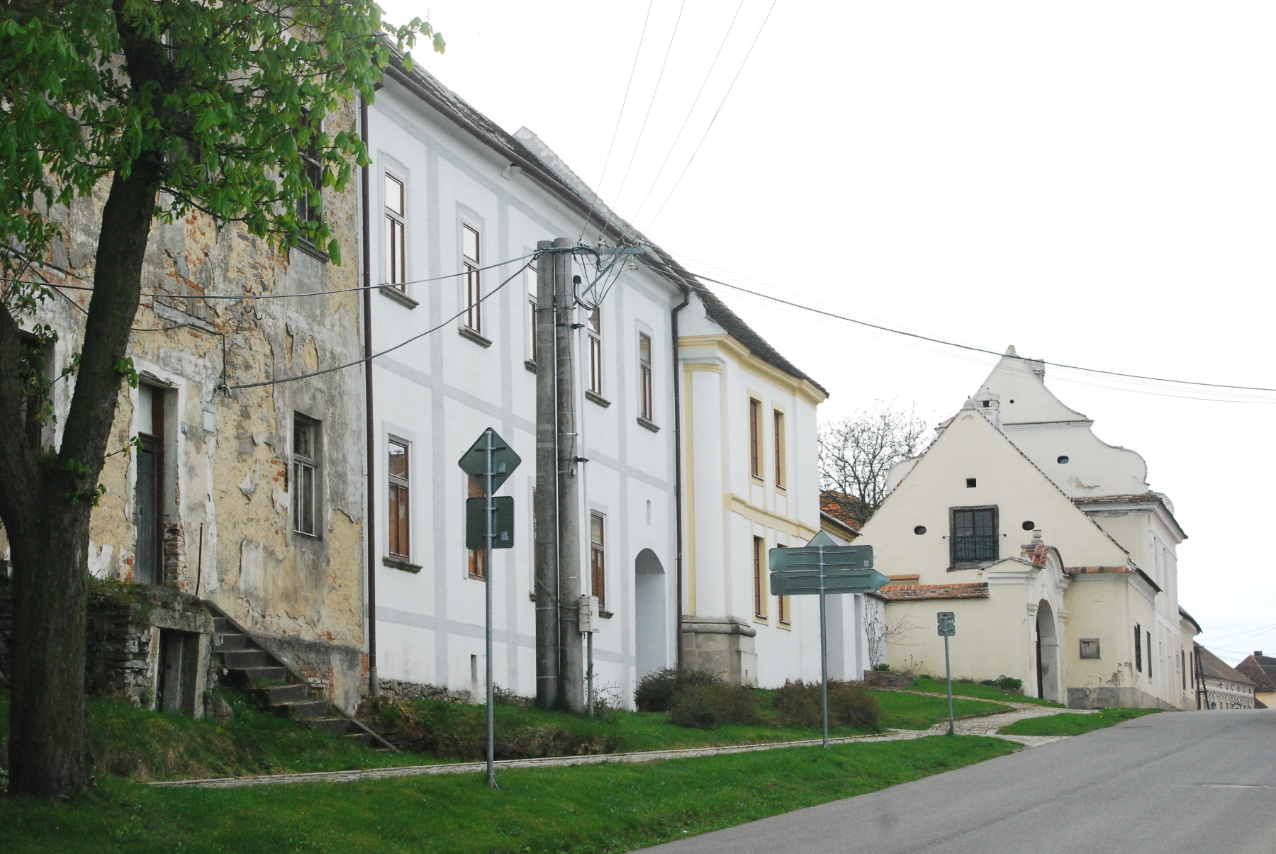 Das ehemalige Kloster in Vratěnín